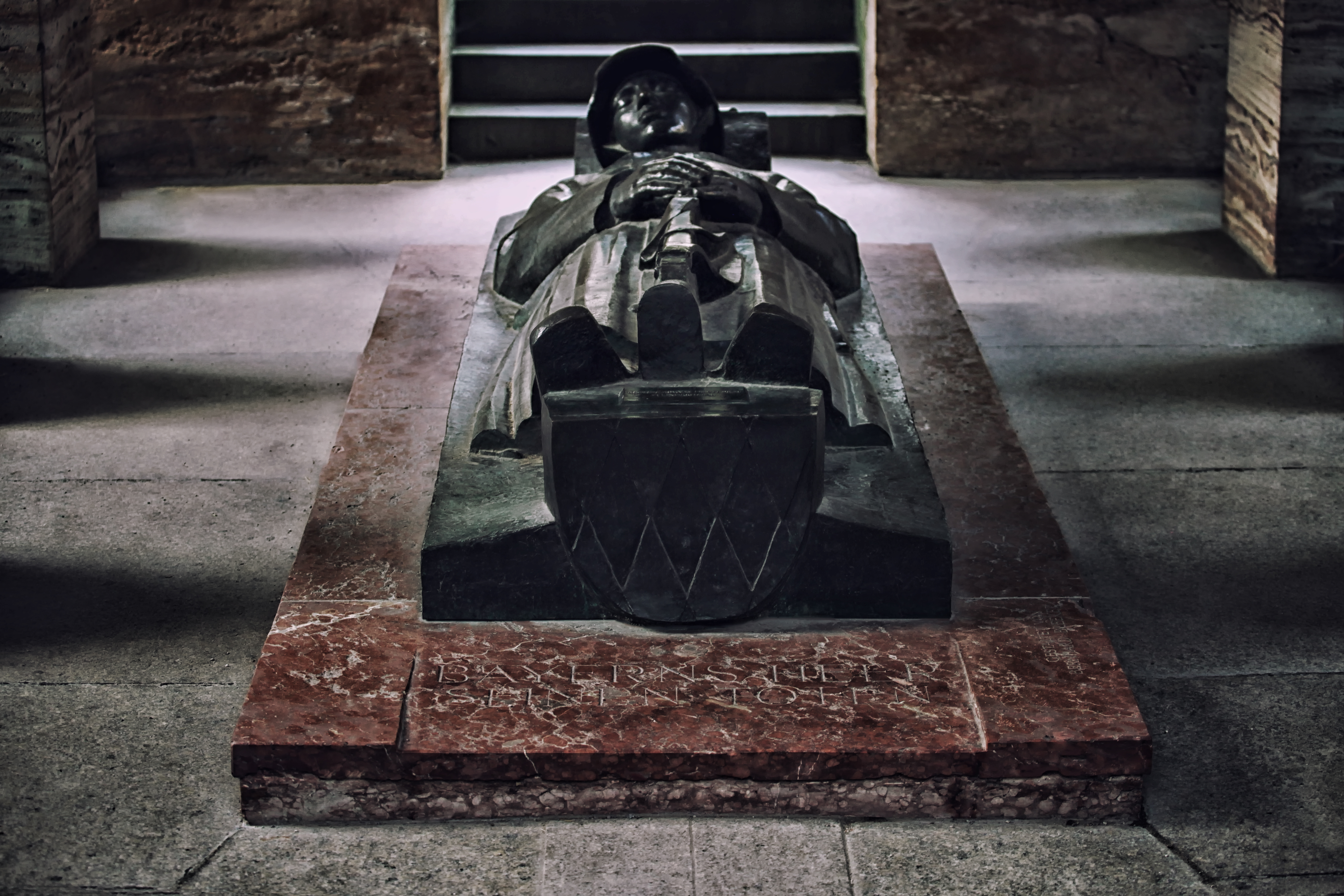 Innenseite, Kriegerdenkmal im Hofgarten - München